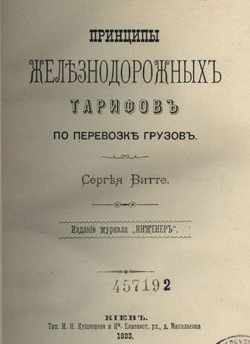 Обложка книги Витте о тарифах